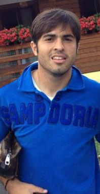 Eder Citadin